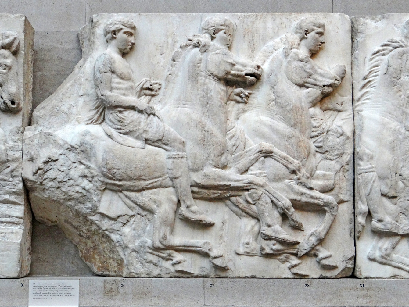 Les rangs de cavaliers de la procession Panneau de la frise des Panathénées (procession qui avait lieu tous les quatre ans) qui courait à l'extérieur du Parthénon sur l'Acropole à Athènes. Le Parthénon était dédié à la déesse Athéna. Construit au milieu du Vè siècle avant J.-C., c'était le temple le plus important de l'Athènes antique. Les panneaux de la frise extérieure, certaines sculptures du fronton et plusieurs métopes ont été amenés en Angleterre au début du XIXè siècle par Lord Elgin. L'Etat grec a demandé sans succès au Royaume-Uni leur restitution. Les pages sur le Parthénon (British Museum)